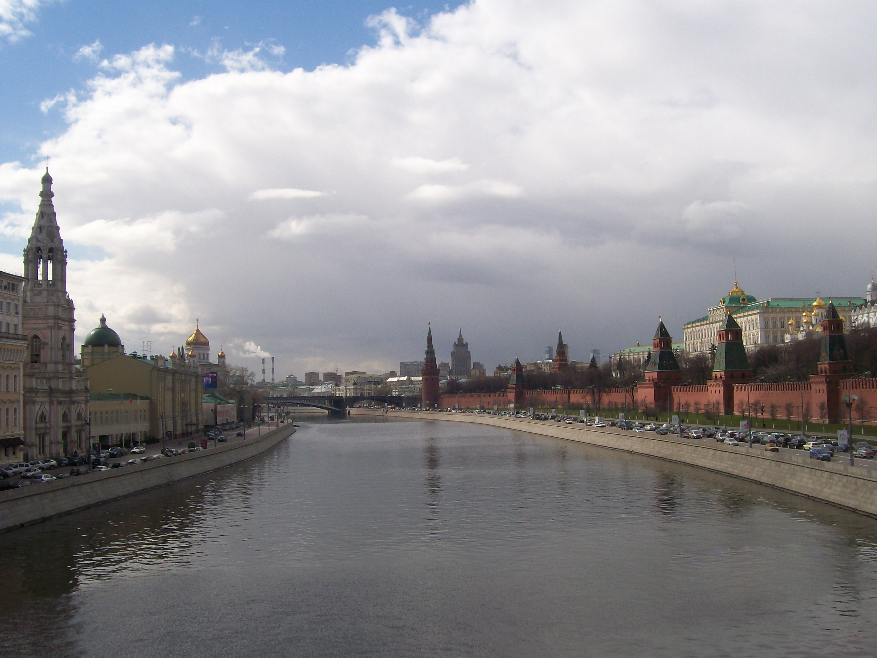 rivière Moskva et Kremlin - Moskva river and Kremlin